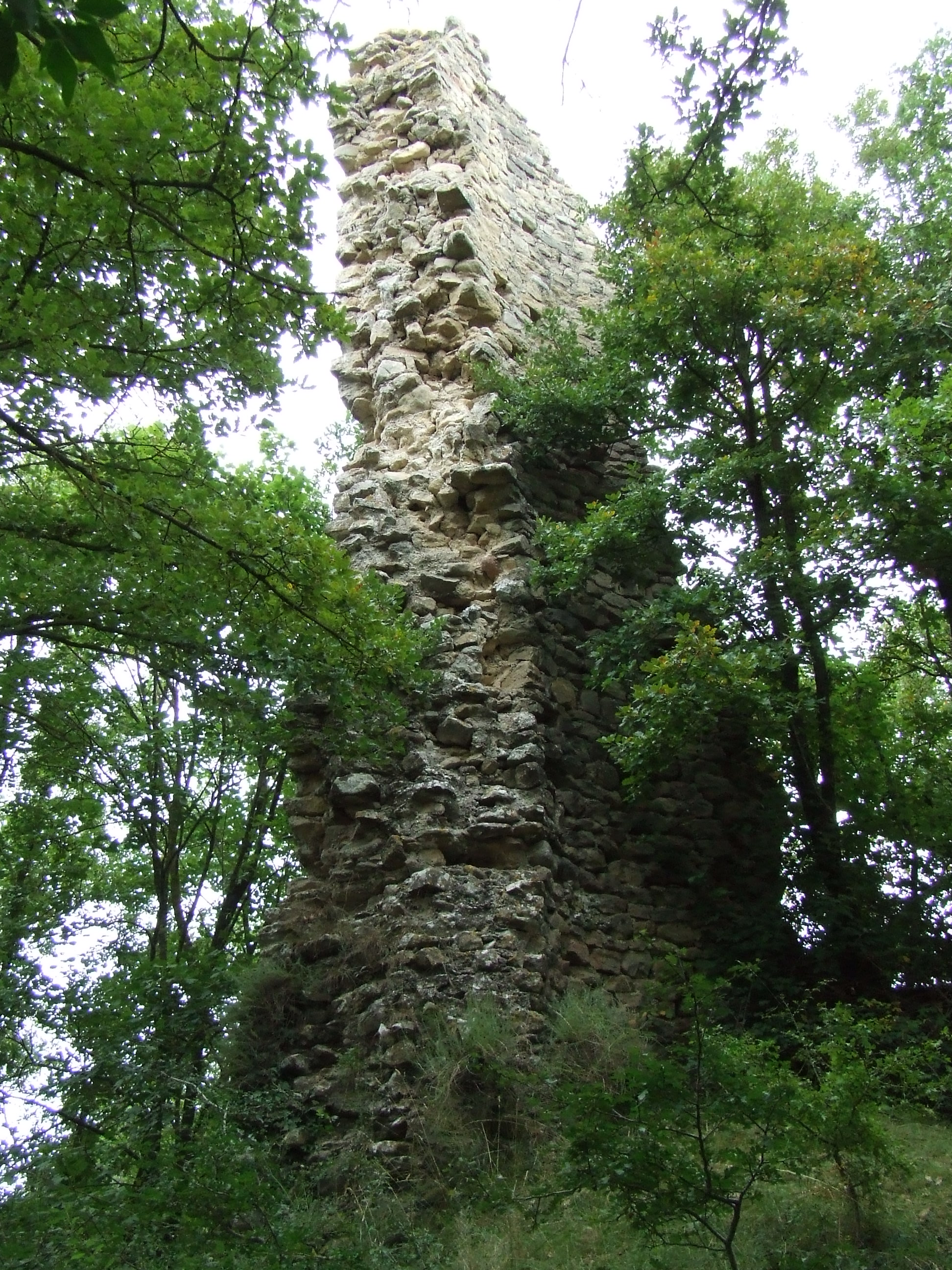 La Torrassa dels Moros (Castellcir, Moianès)